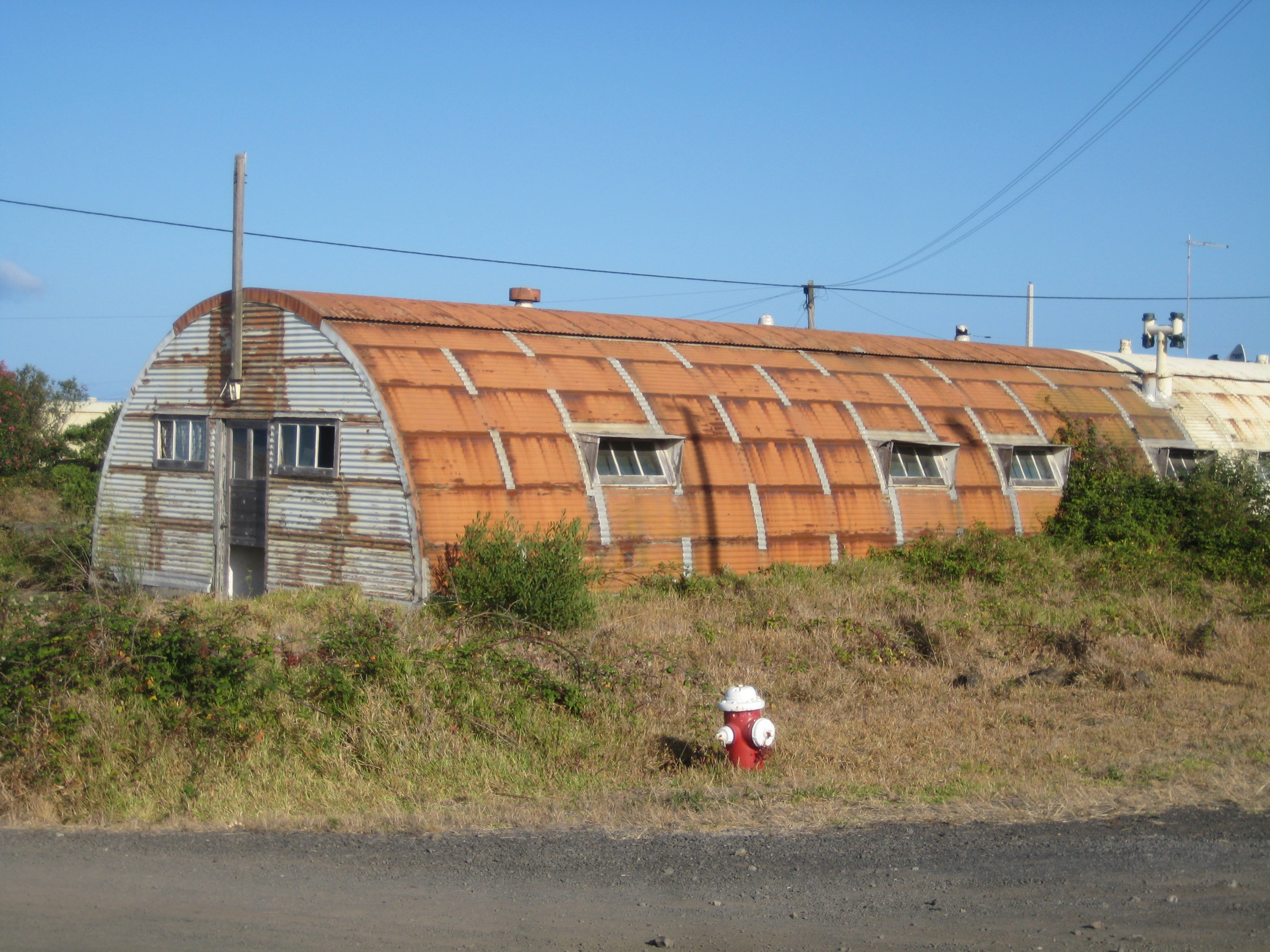 Hangar y boca de agua para incendios